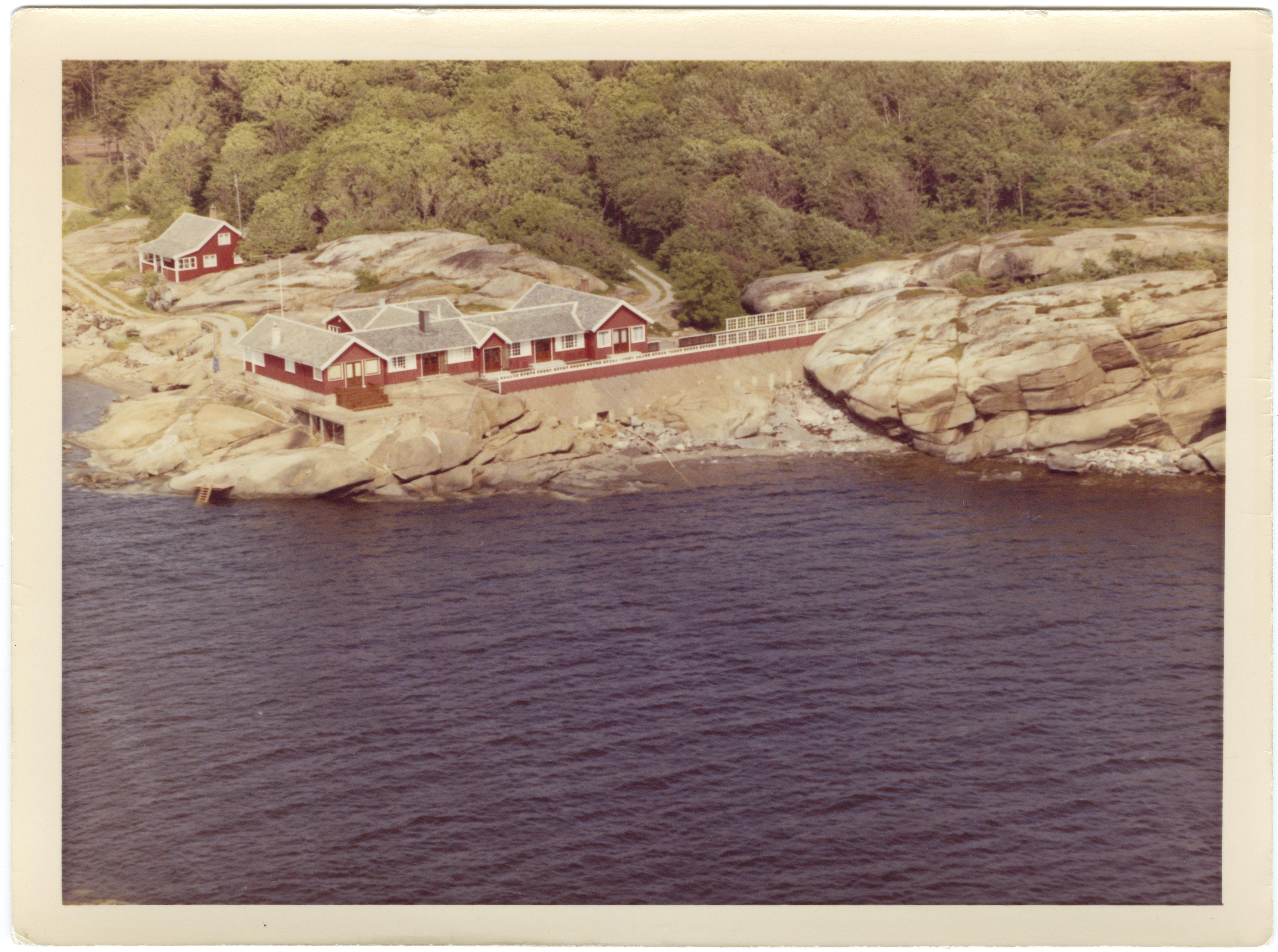 WF.S.166181